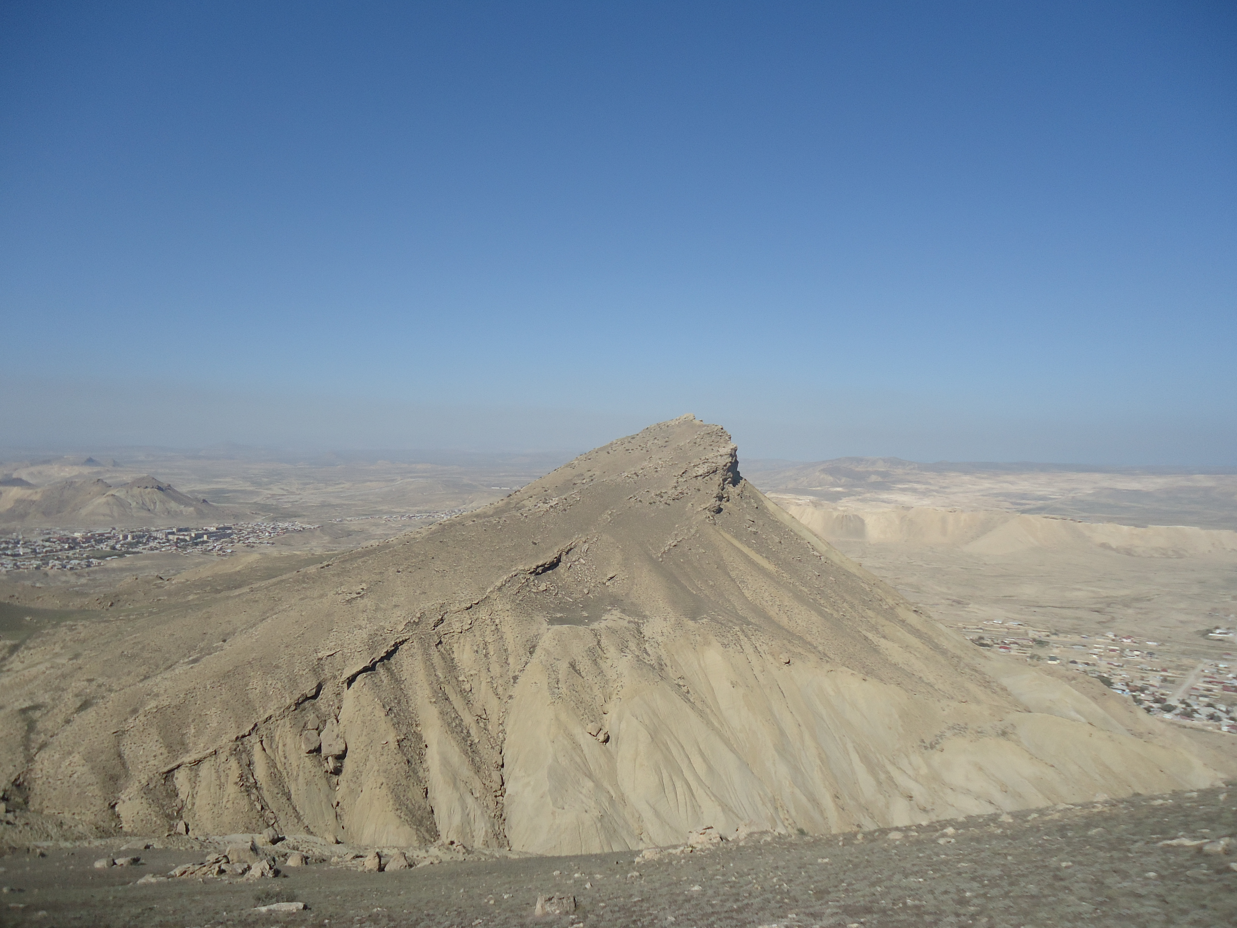 Bakı qulaqları (Kərkəs dağı) – Puta burnundan 8,5 km qərb, şimal-qərbdə yerləşən iki yüksəklikdən ibarət dağ